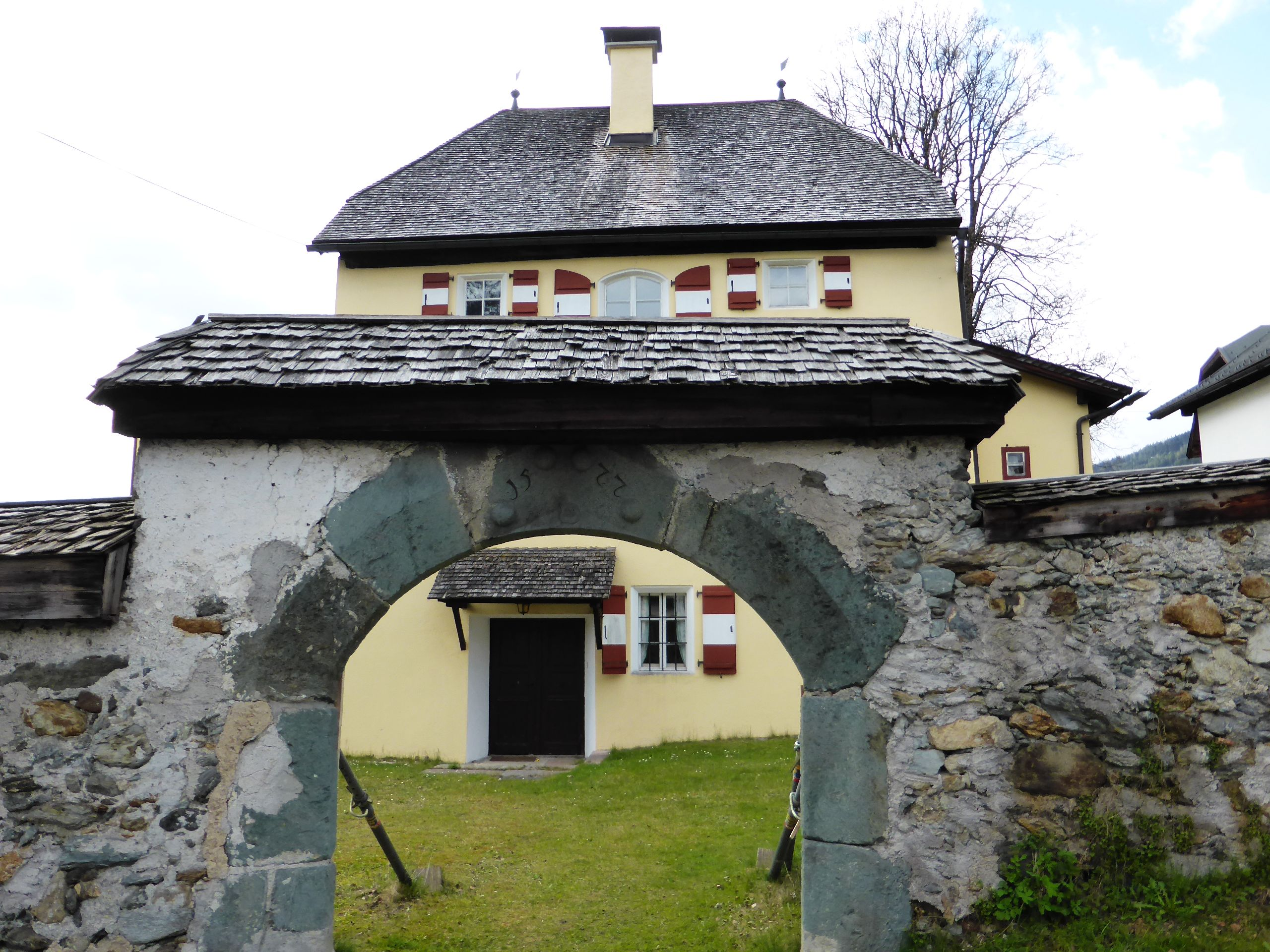 Anlage Schloss Mauer